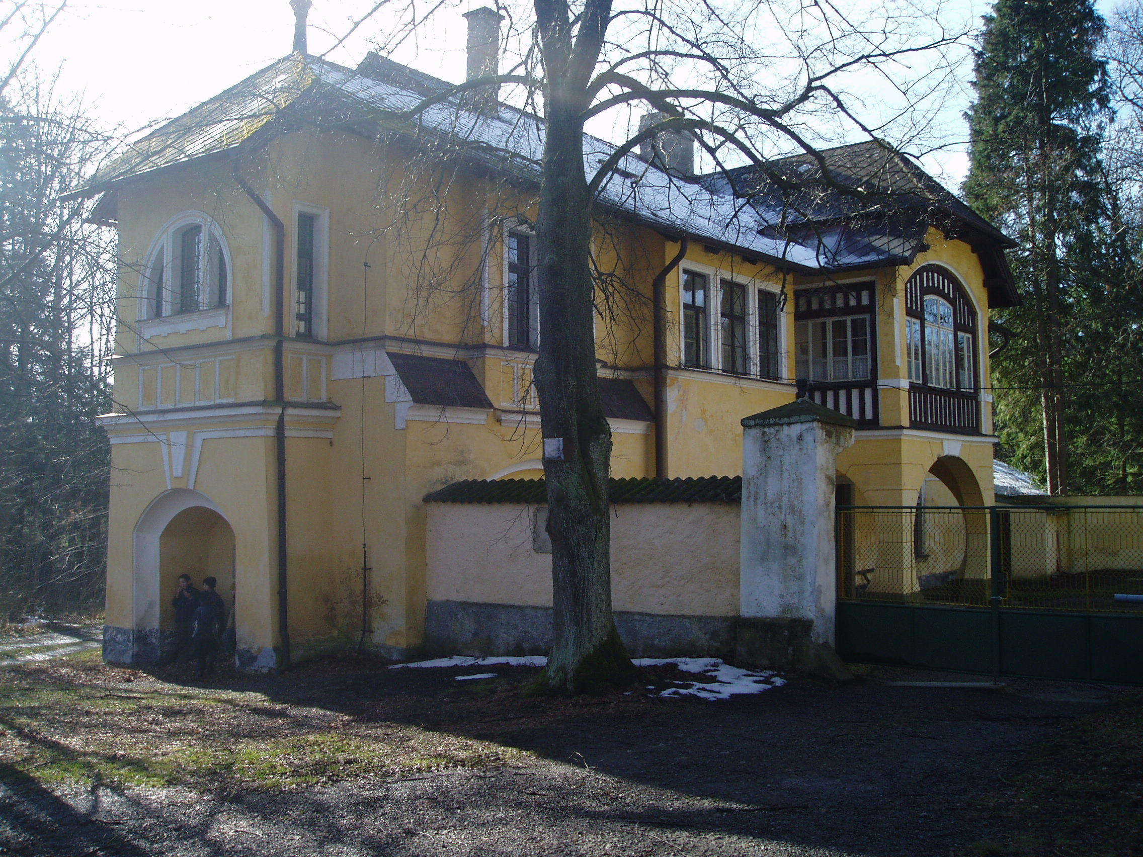 Zámek Roželov